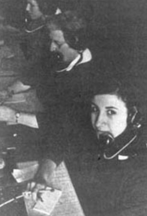 Donostiako zentralitako argazkia